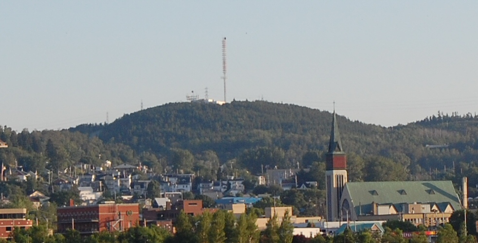 Mont Sainte-Claire surplombant le centre-ville de Chicoutimi